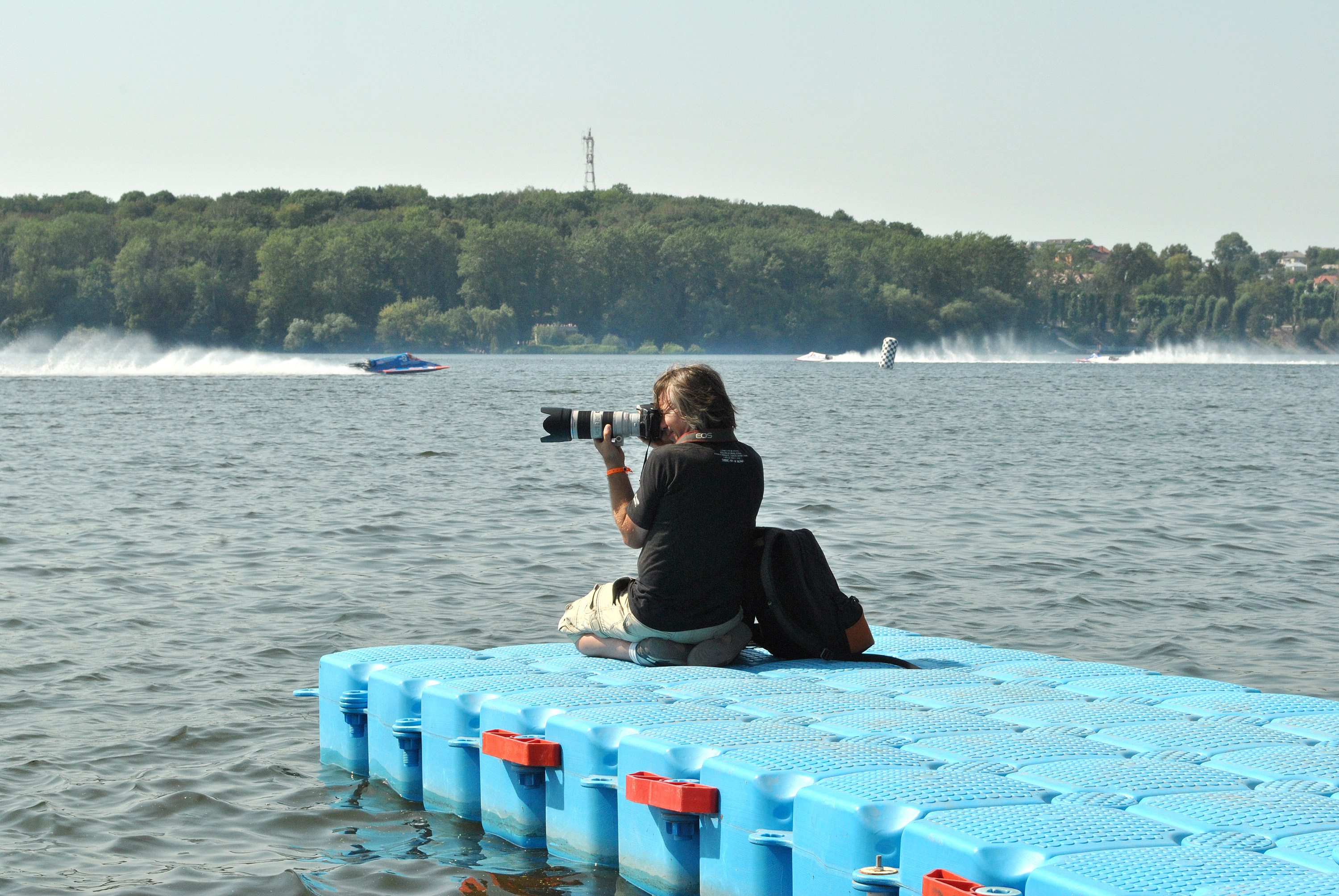 Український фотохудожник, фотожурналіст, військовик Тарас Хлібович під час зйомок Чемпіонату з водно-моторних видів спорту в Тернополі 26 серпня 2012 року.